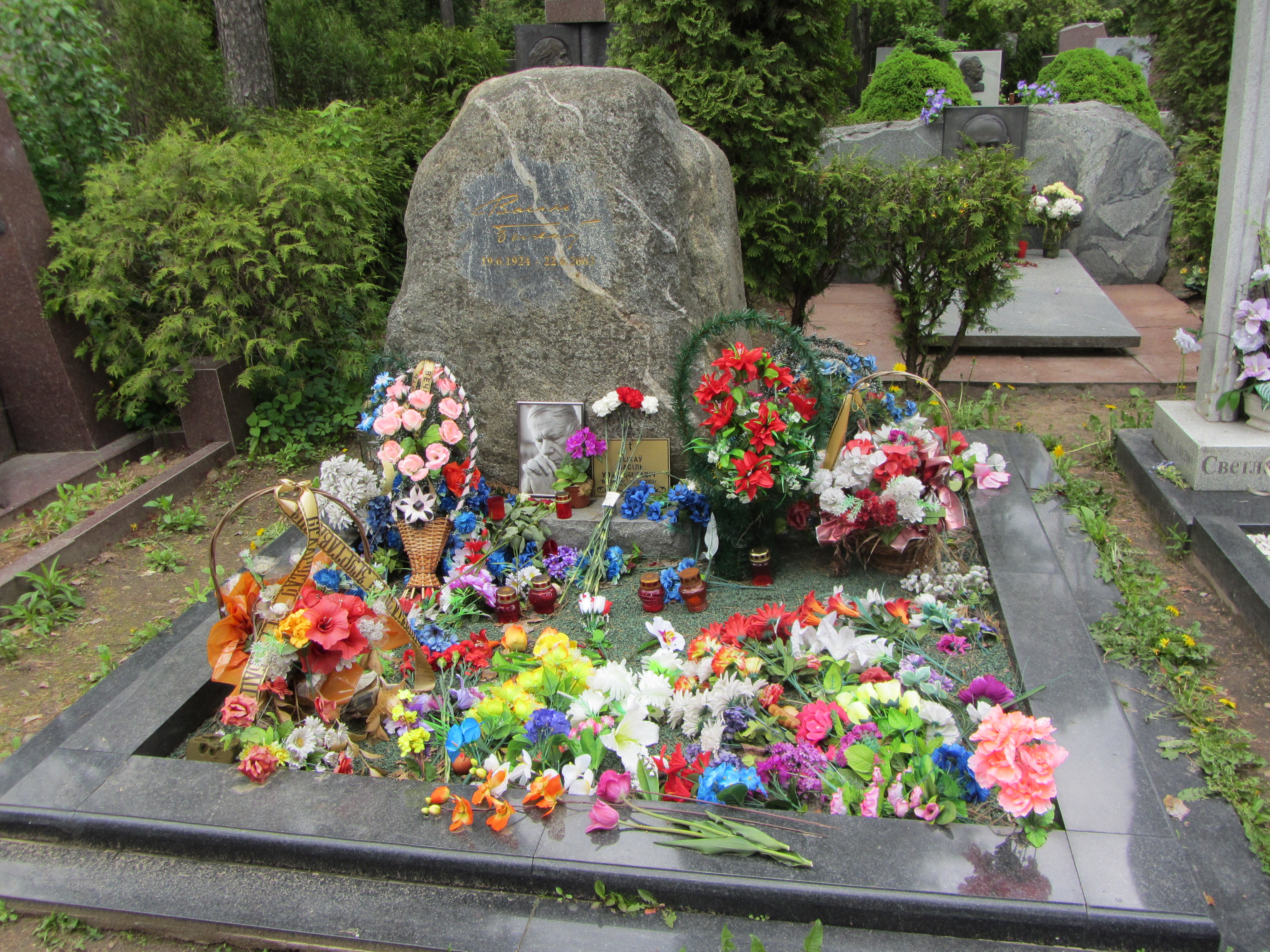 Беларуская (тарашкевіца): Магіла Васіля Быкава на Ўсходніх могілках у Менску